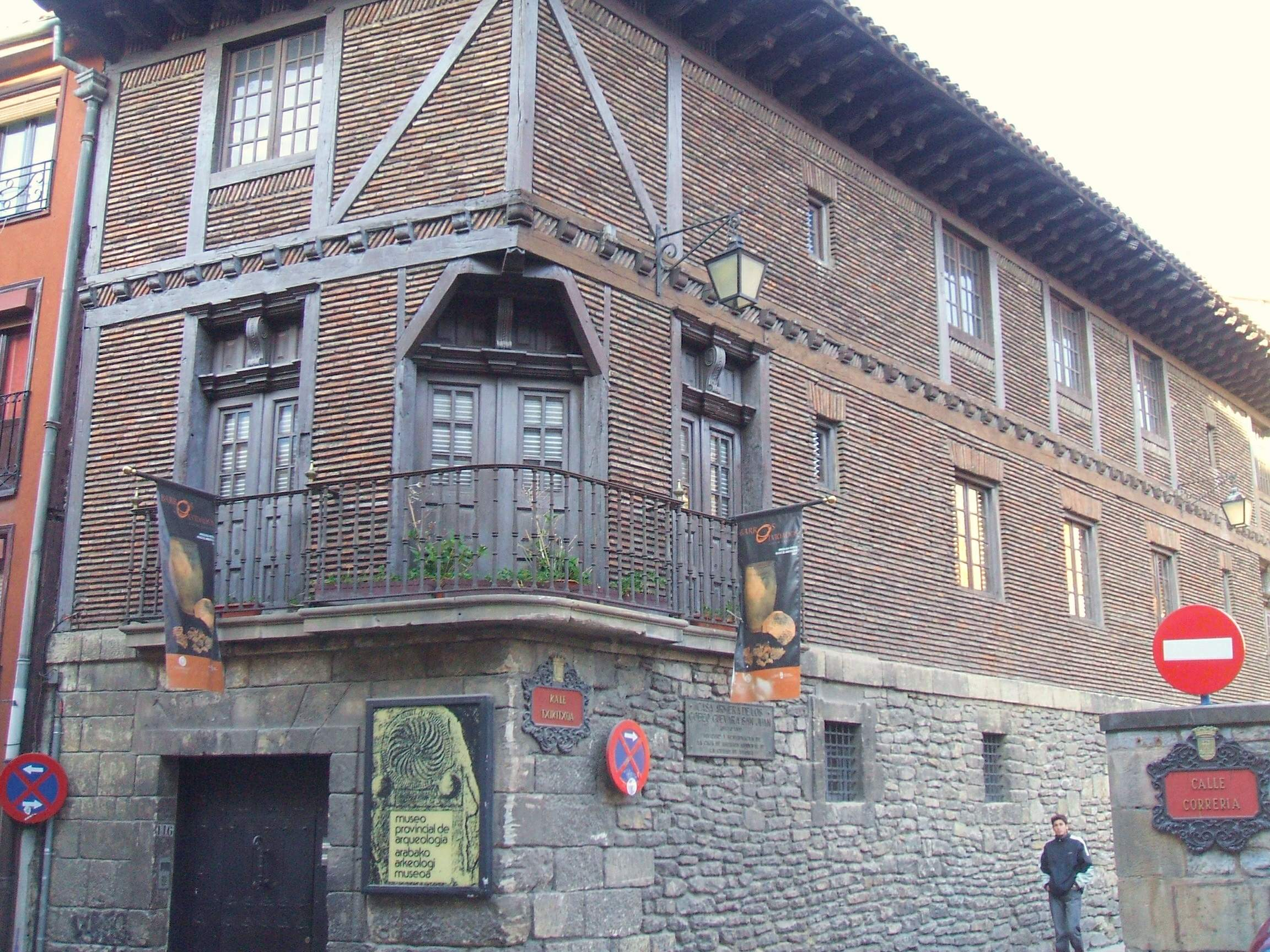 Palacio Gobeo-Guevara-San Juan (antiguo Museo Provincial de Arqueología), en Vitoria